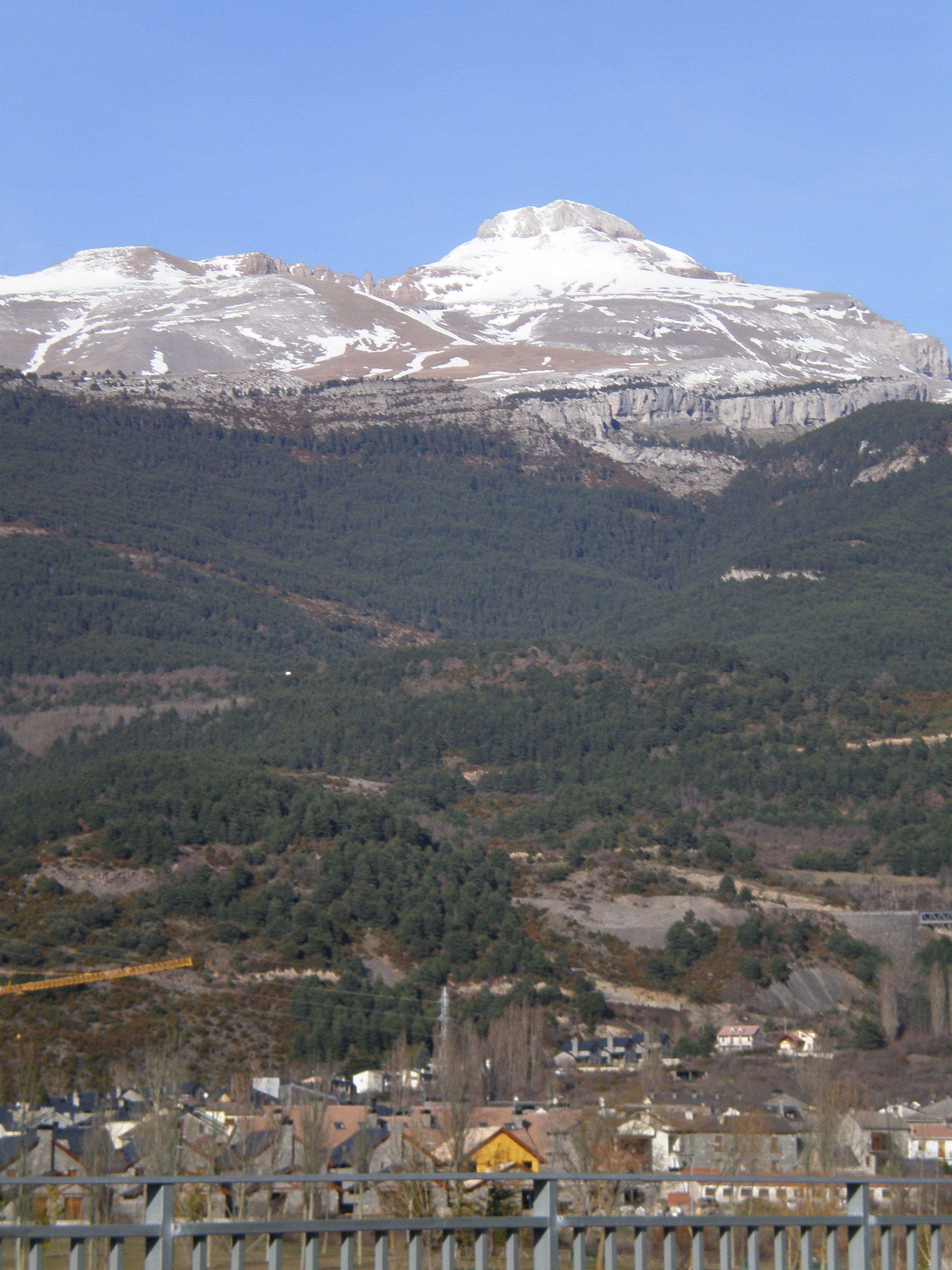 Villanúa a los pies del Pico Collarada